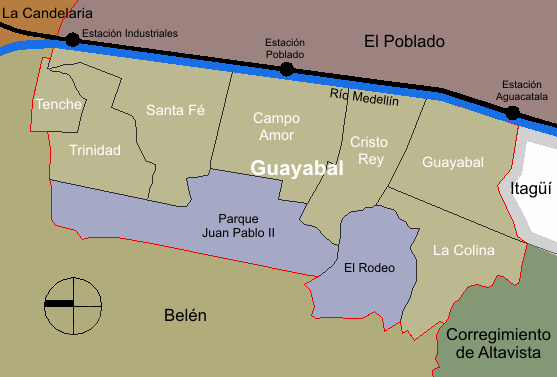 mapa de la división barrial de la comuna Guayabal. Medellín, Colombia.